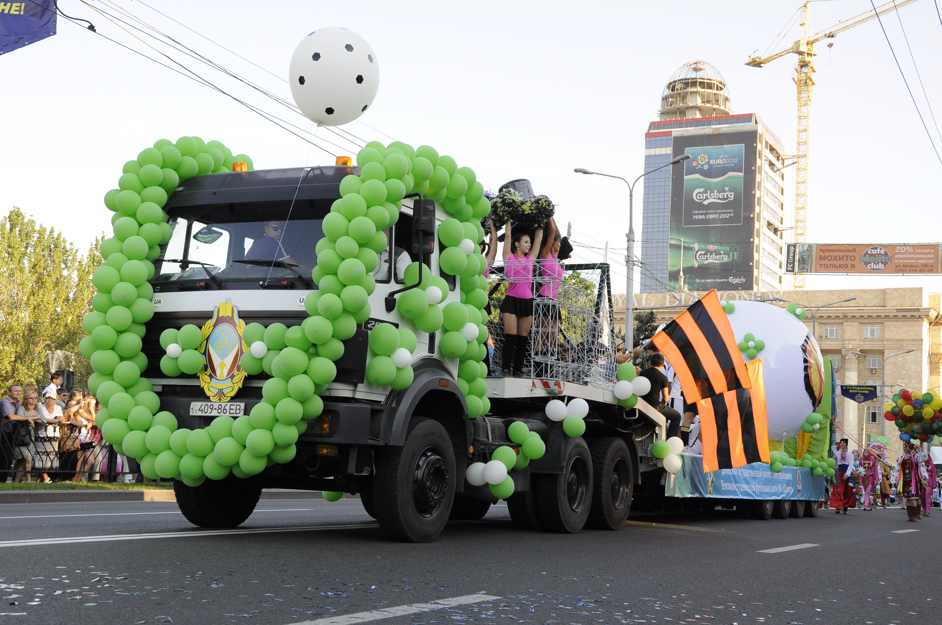 Донецк. День города. Карнавал.